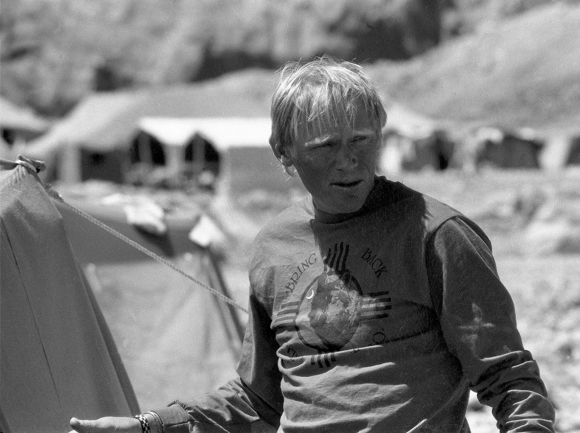 Anatoli Bukrejev. Raamatu „Tõus“, traagilised ambitsioonid Everestil, üks autoritest.